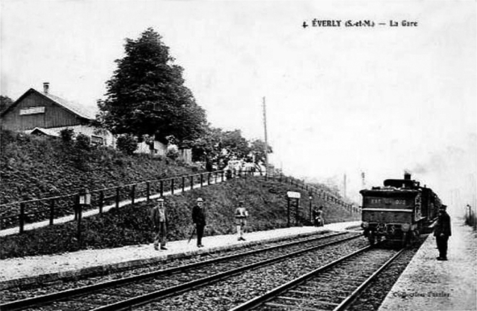 La gare de Chalmaison - Everly vers 1900, vue du quai extérieur avec le bâtiment voyageurs provisoir en haut de la tranchée.